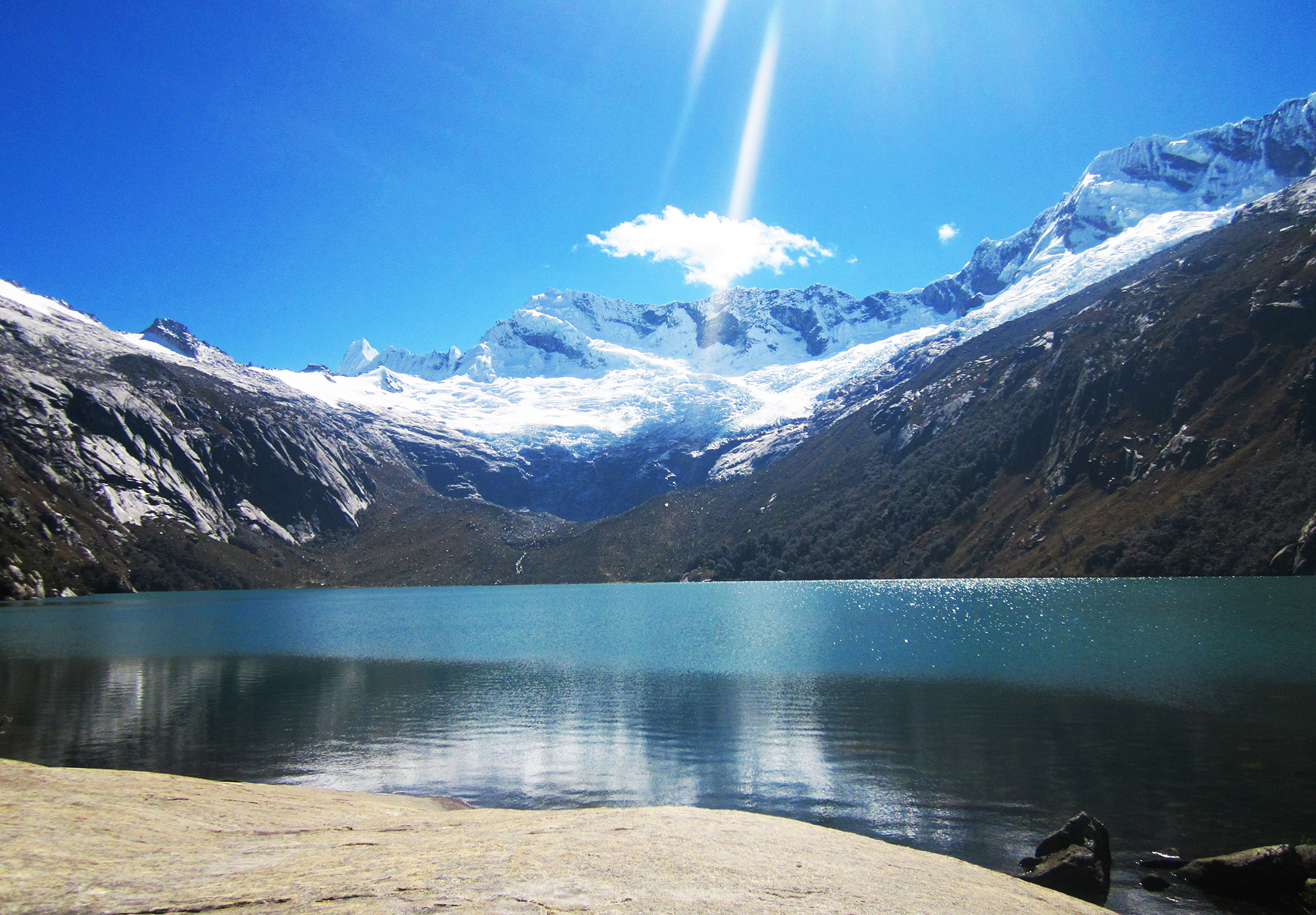 Laguna Auquiscocha con el glaciar Chequiaraju